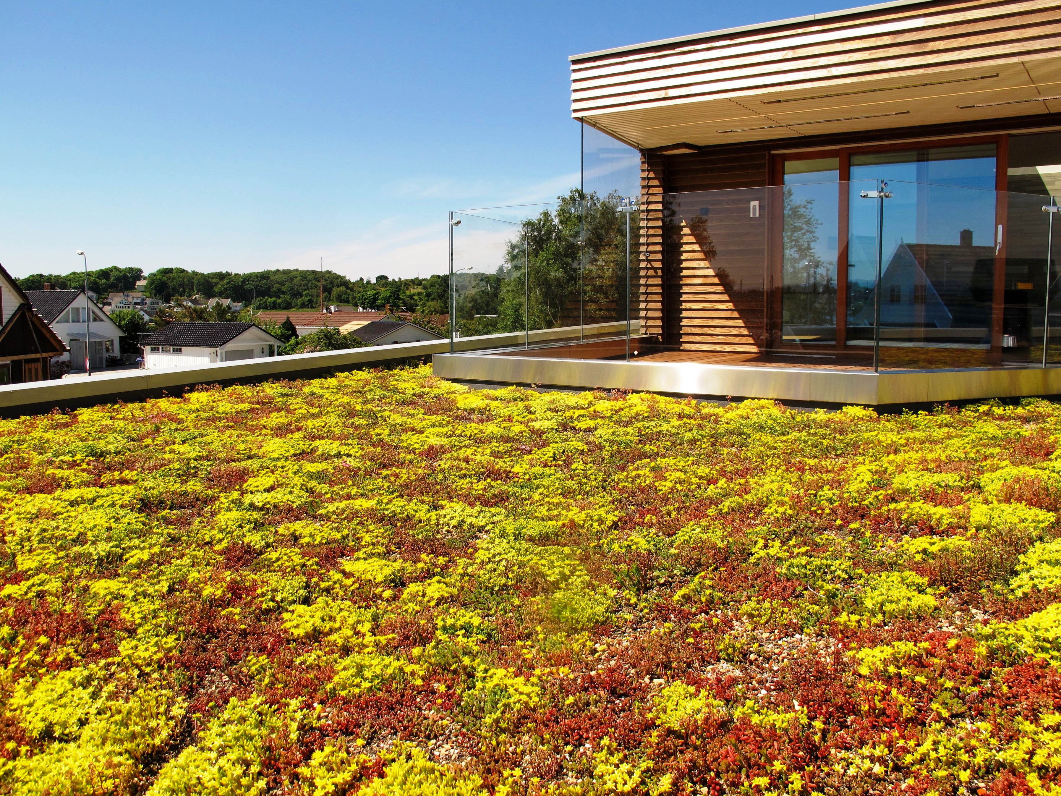 Låglutande grönt tak med sedumvegetation